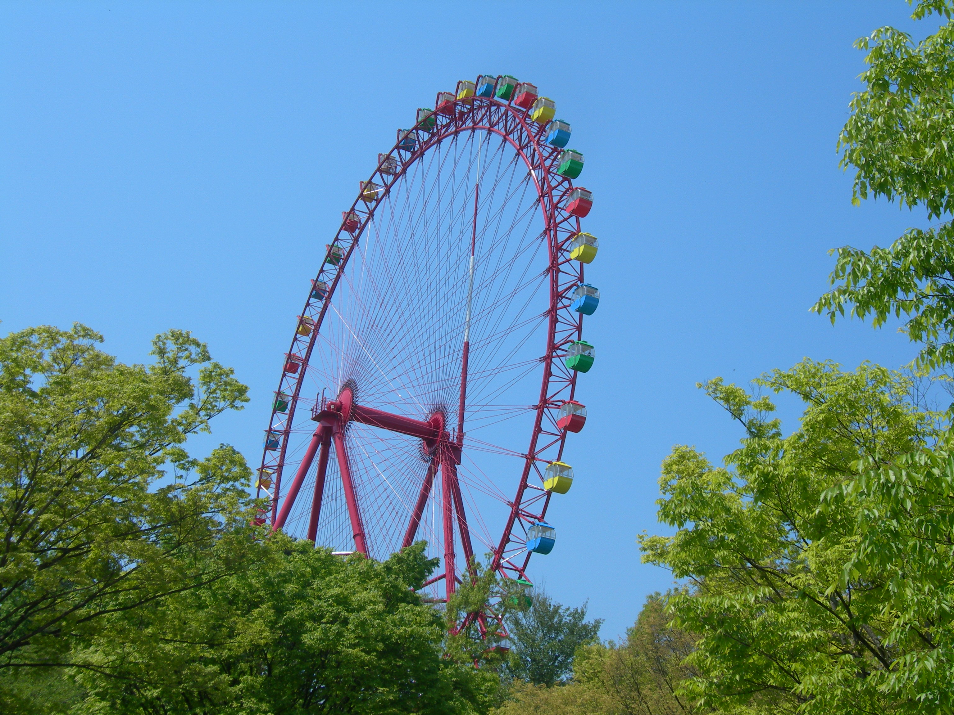 西武園ゆうえんちの大観覧車